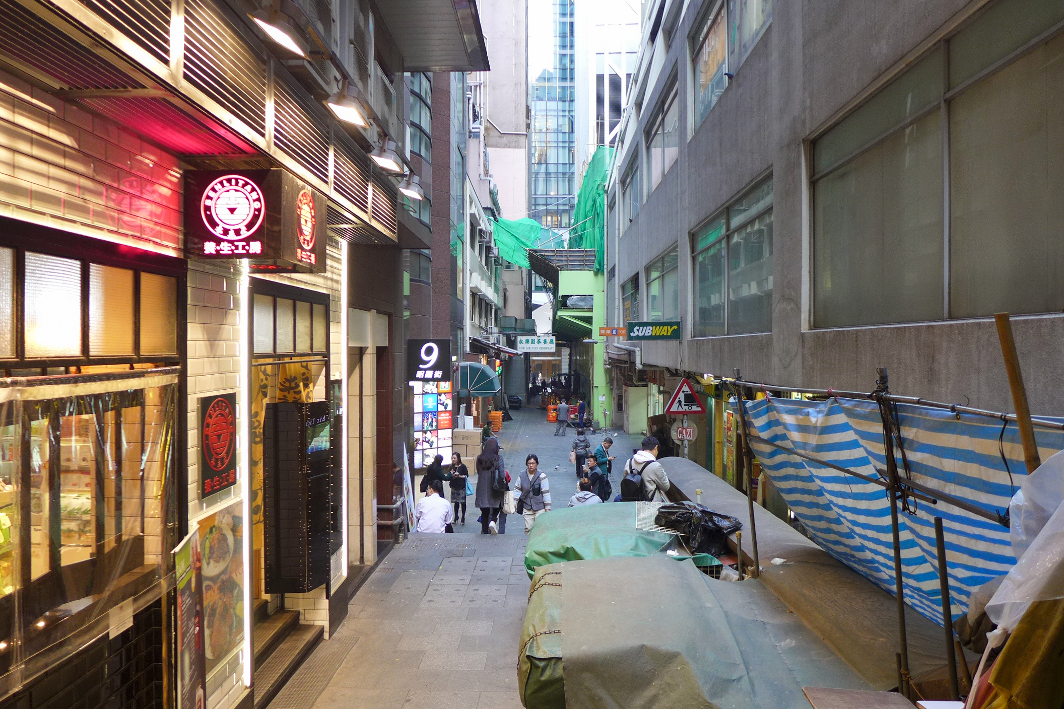 Chiu Lung Street